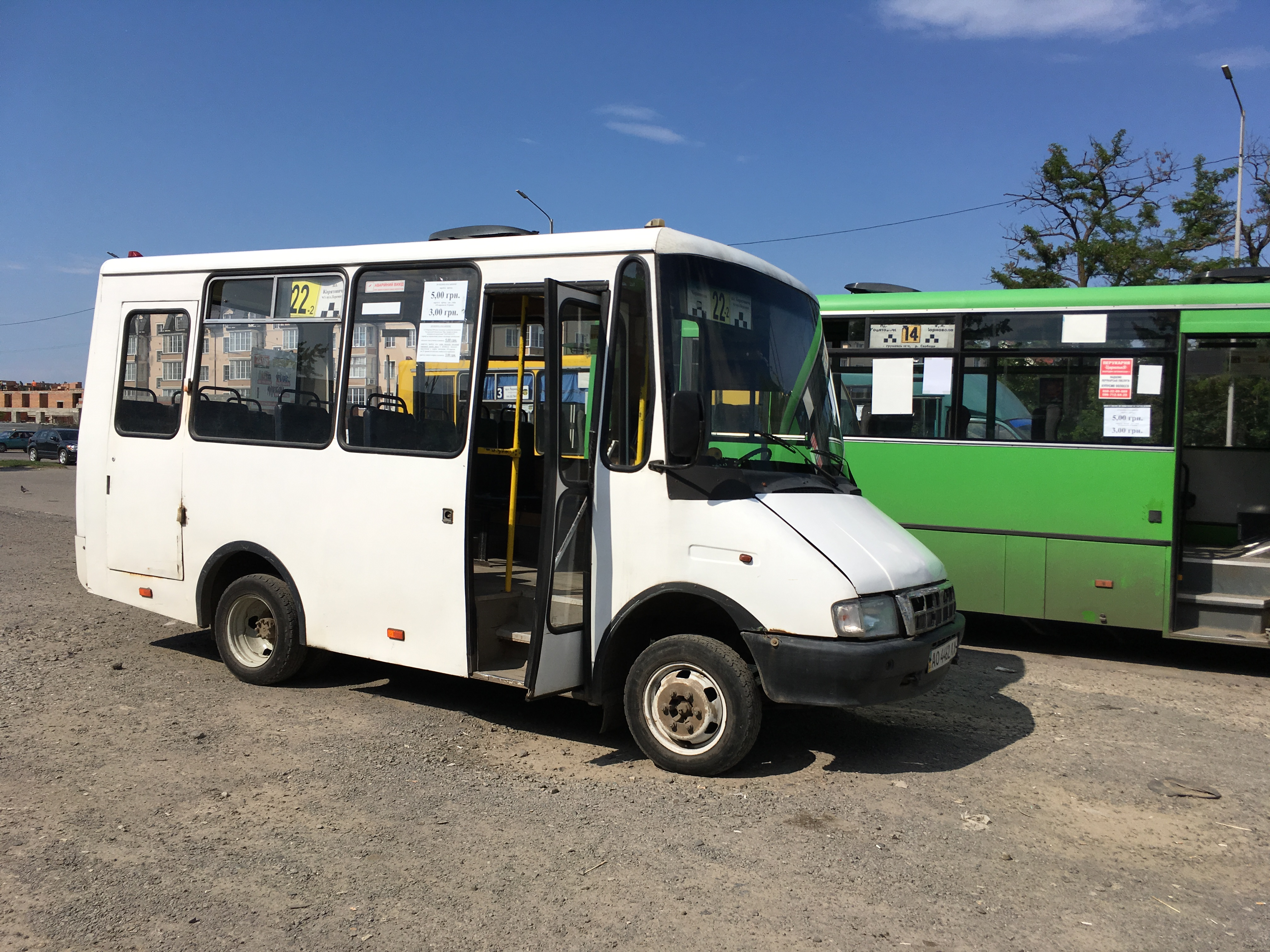 Marshrutka Line 22 in Uzhhorod